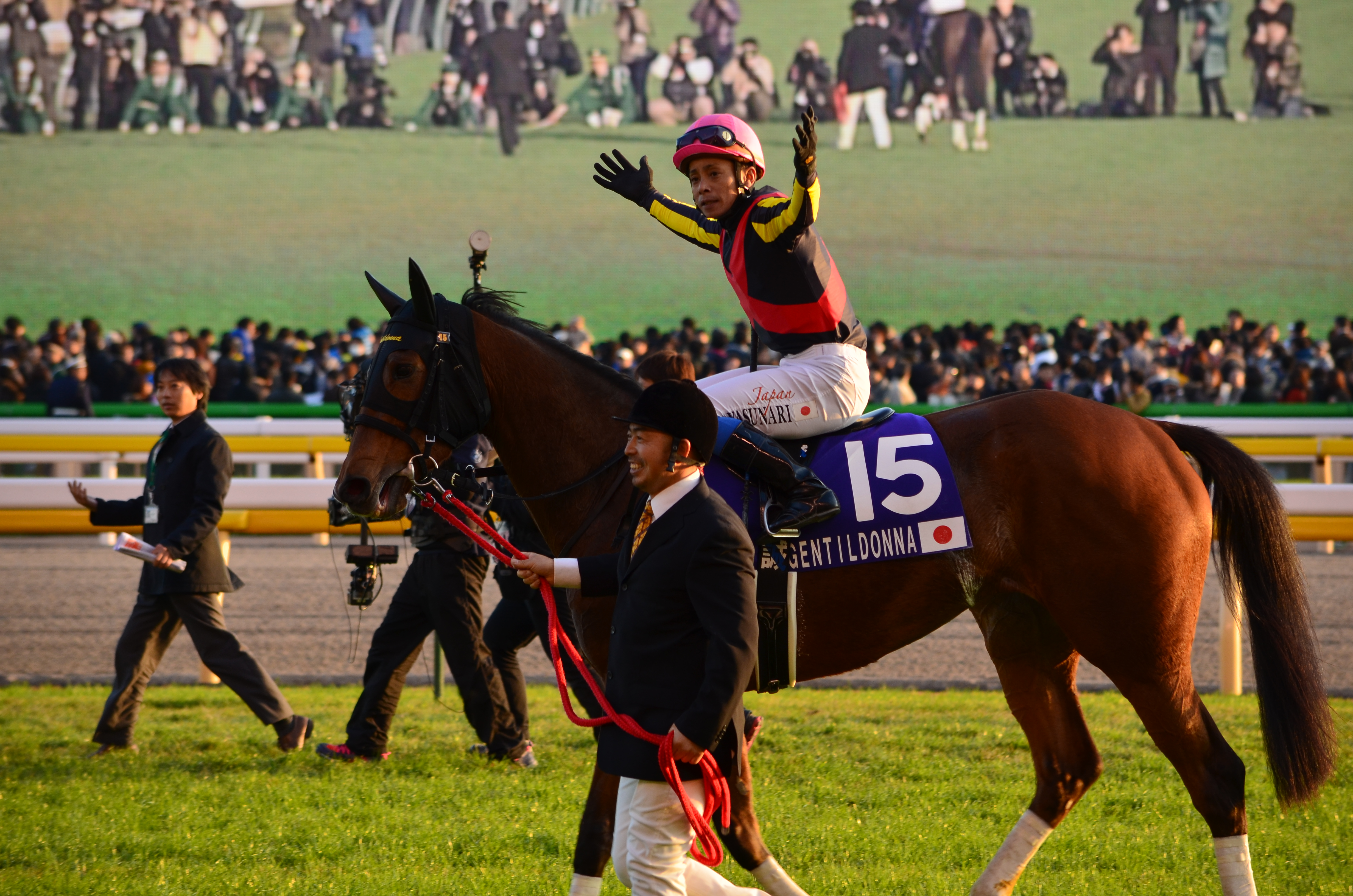 ２０１２年ジャパンカップ